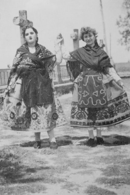 Villanueva del Campo (Zamora) - Trajes tradicionales. 1946 - Fotografía 100 x 150 B/N